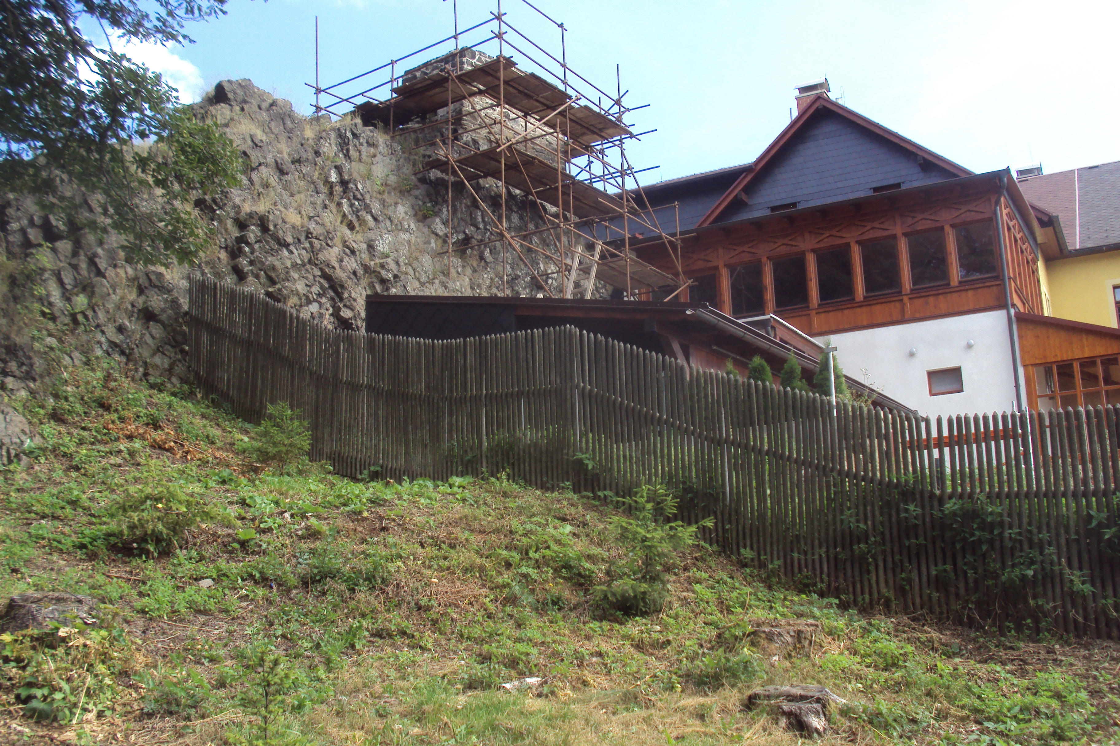 Vrchol Jánských kamenů